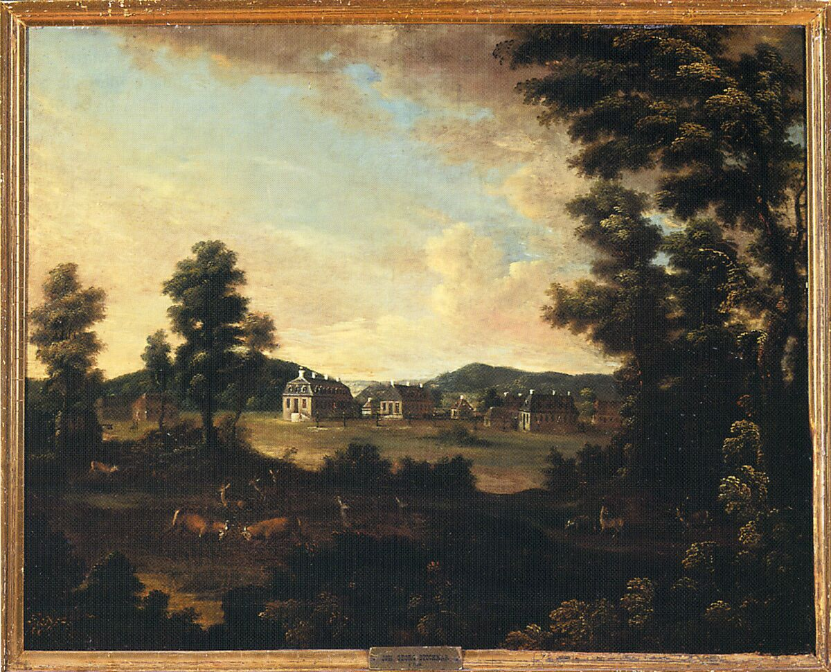 Ansicht der Kleudelburg bei Battenberg